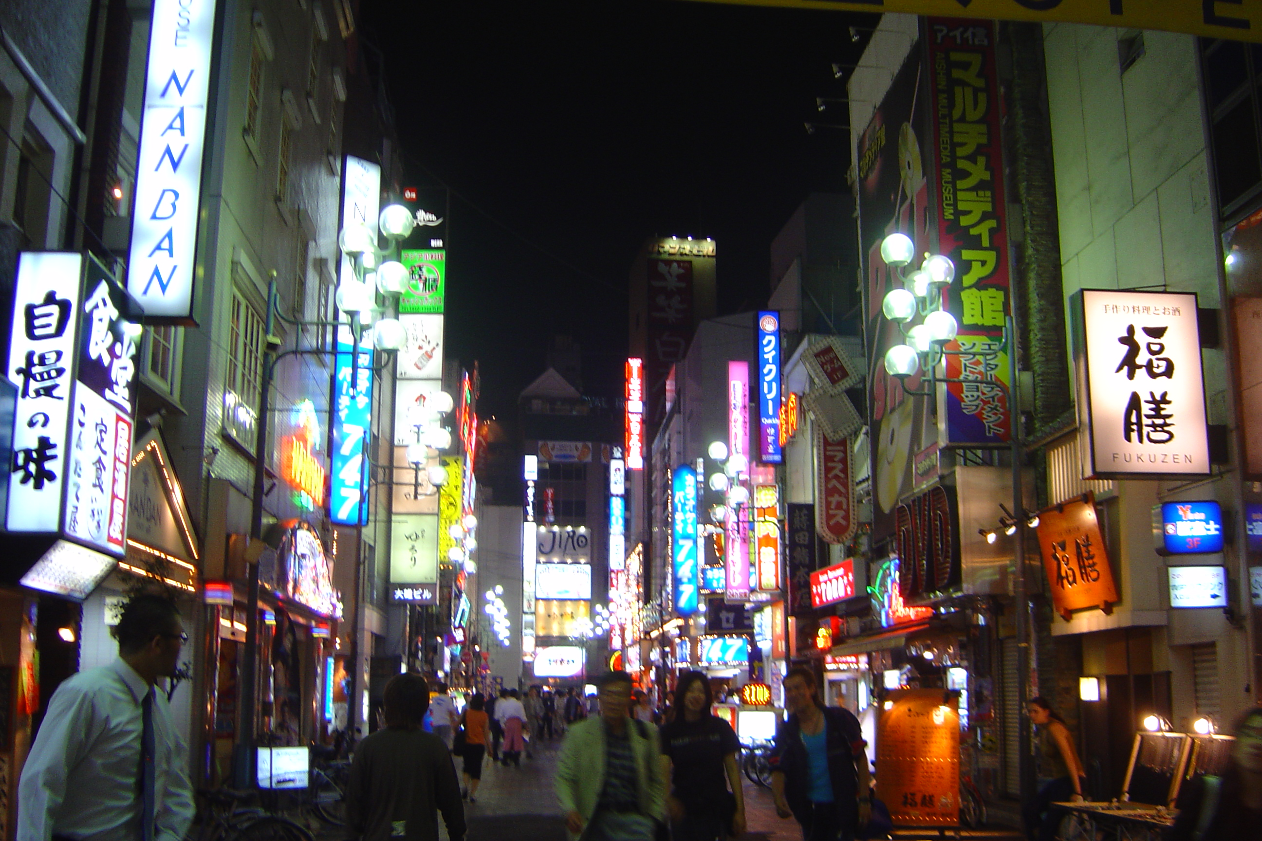 Ikebukuro, Tokyo, Japan